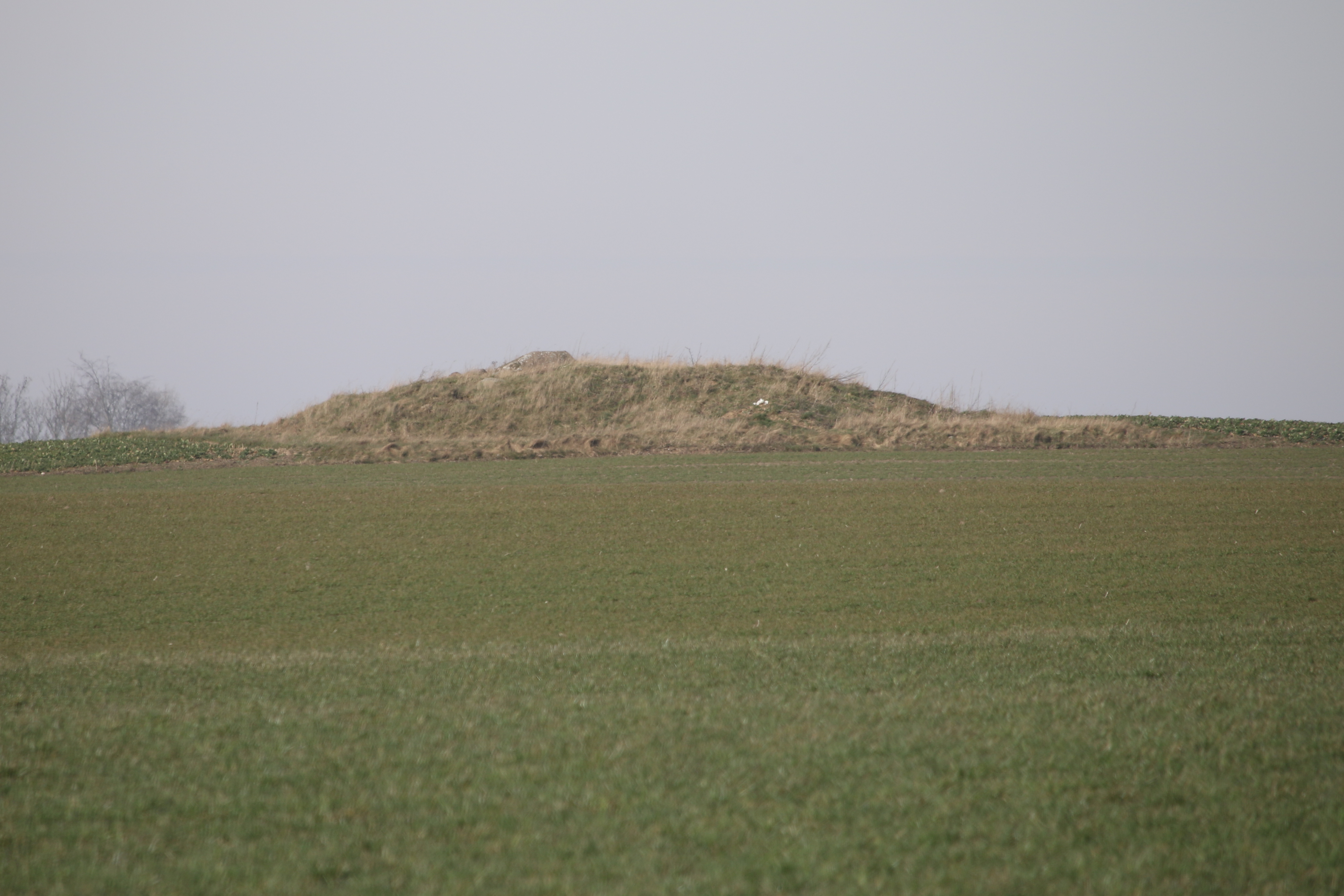 Albertshög, Löderup 31-1, stenkammargrav i Ystads kommun